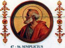 Pope Simplicius